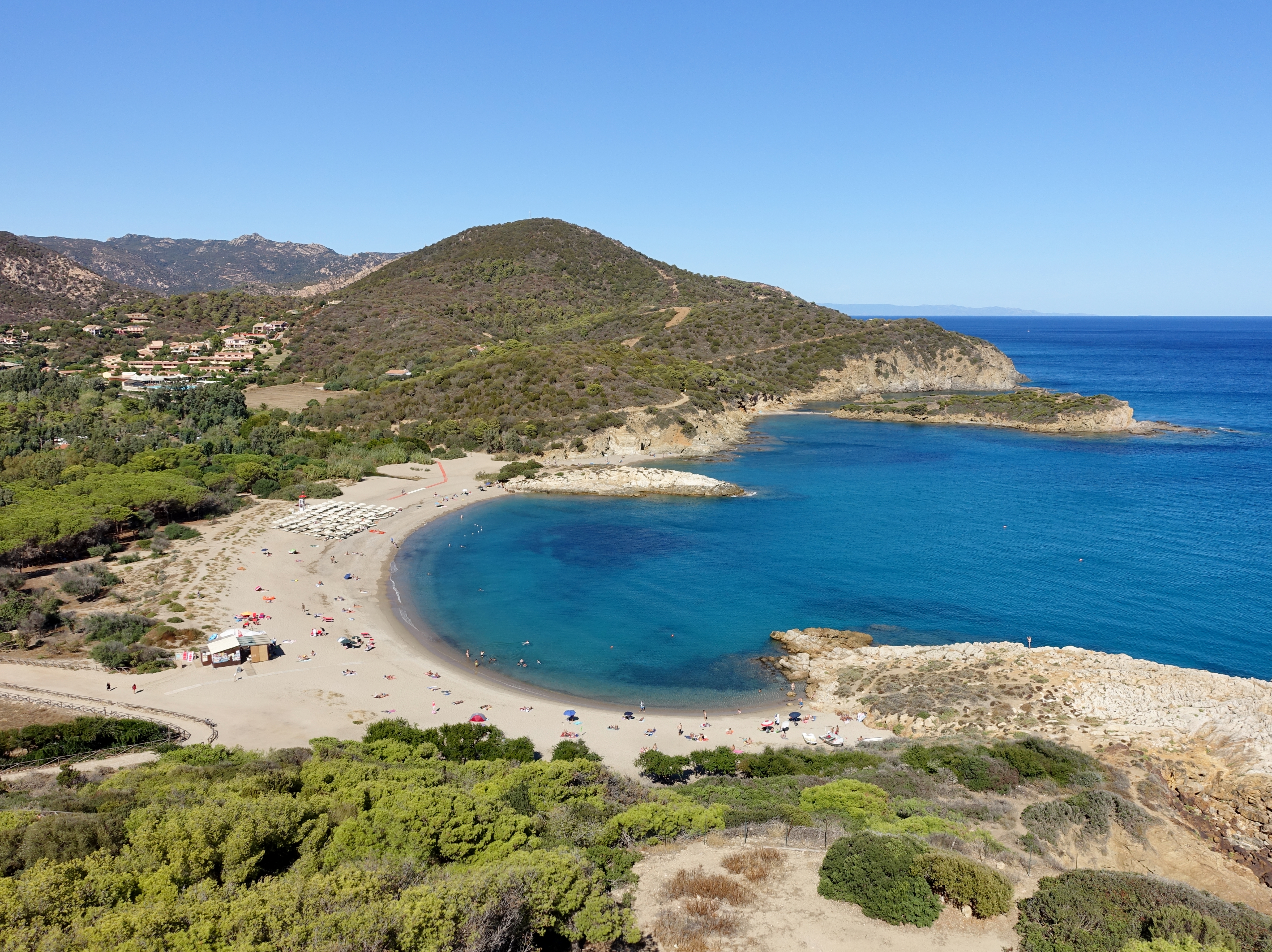 Strand Su Portu (Spiaggia Su Portu), Gemeinde Domus de Maria, Sardinien, Italien